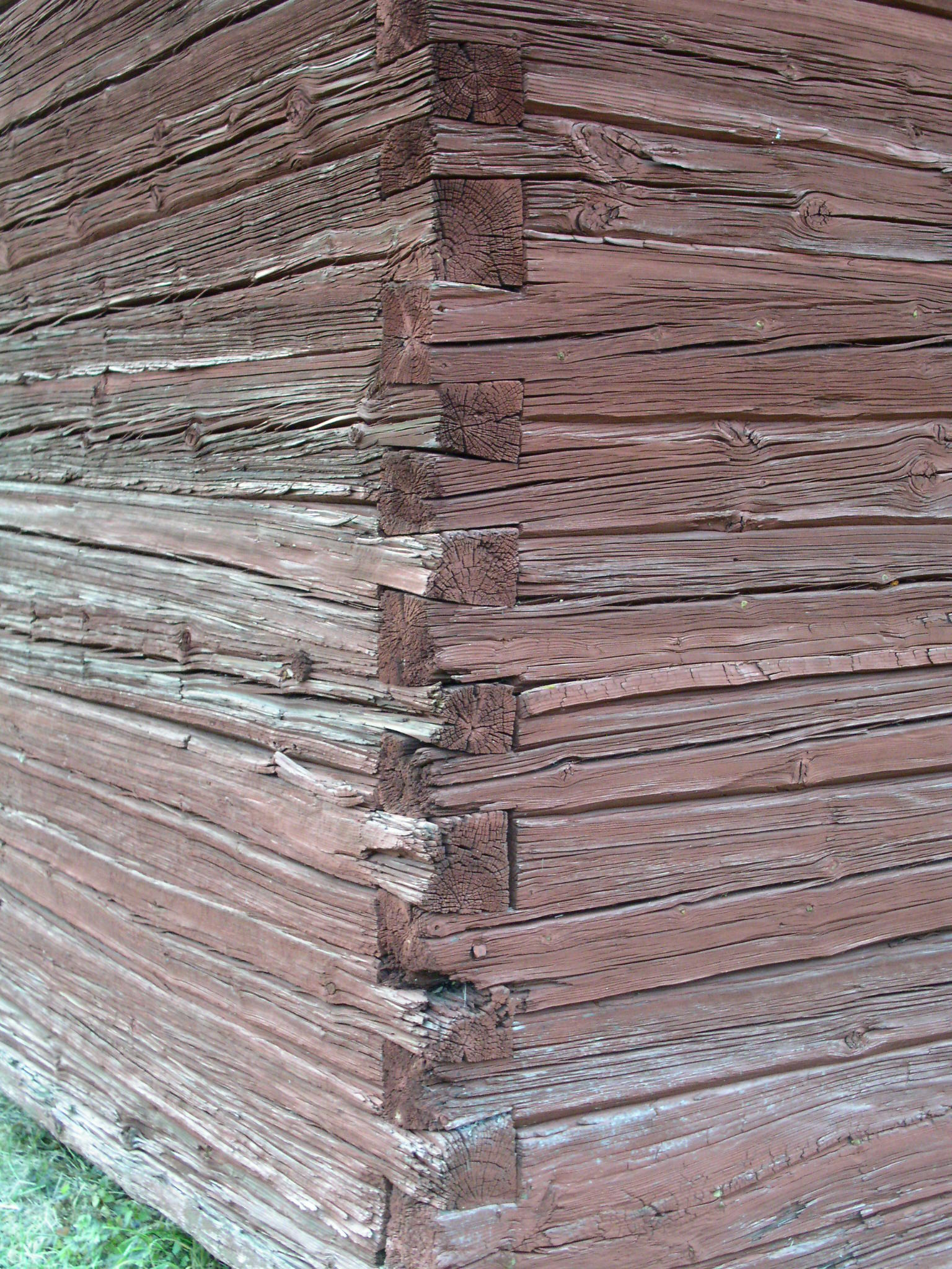 Detalj från bod timrad med laxknutar eller slätknutar, troligen omkring år 1900. Grangärde sn, Dalarna